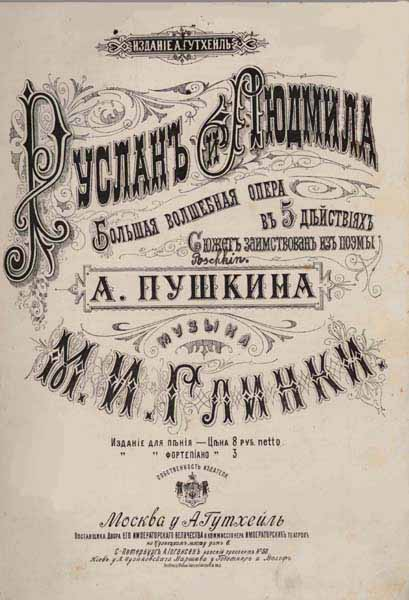 Опера М. И. Глинки "Руслан и Людмила". Обложка издания Гутхейля, 1885